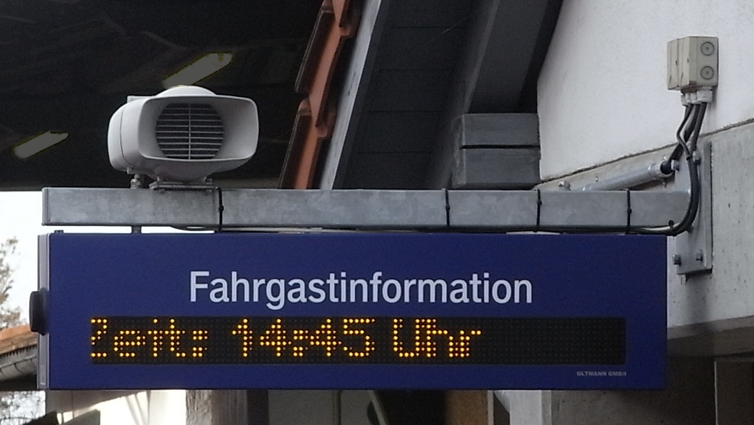 Dynamischer Schriftanzeiger, zweiseitige Ausführung, am Bahnhof Ostermünchen.